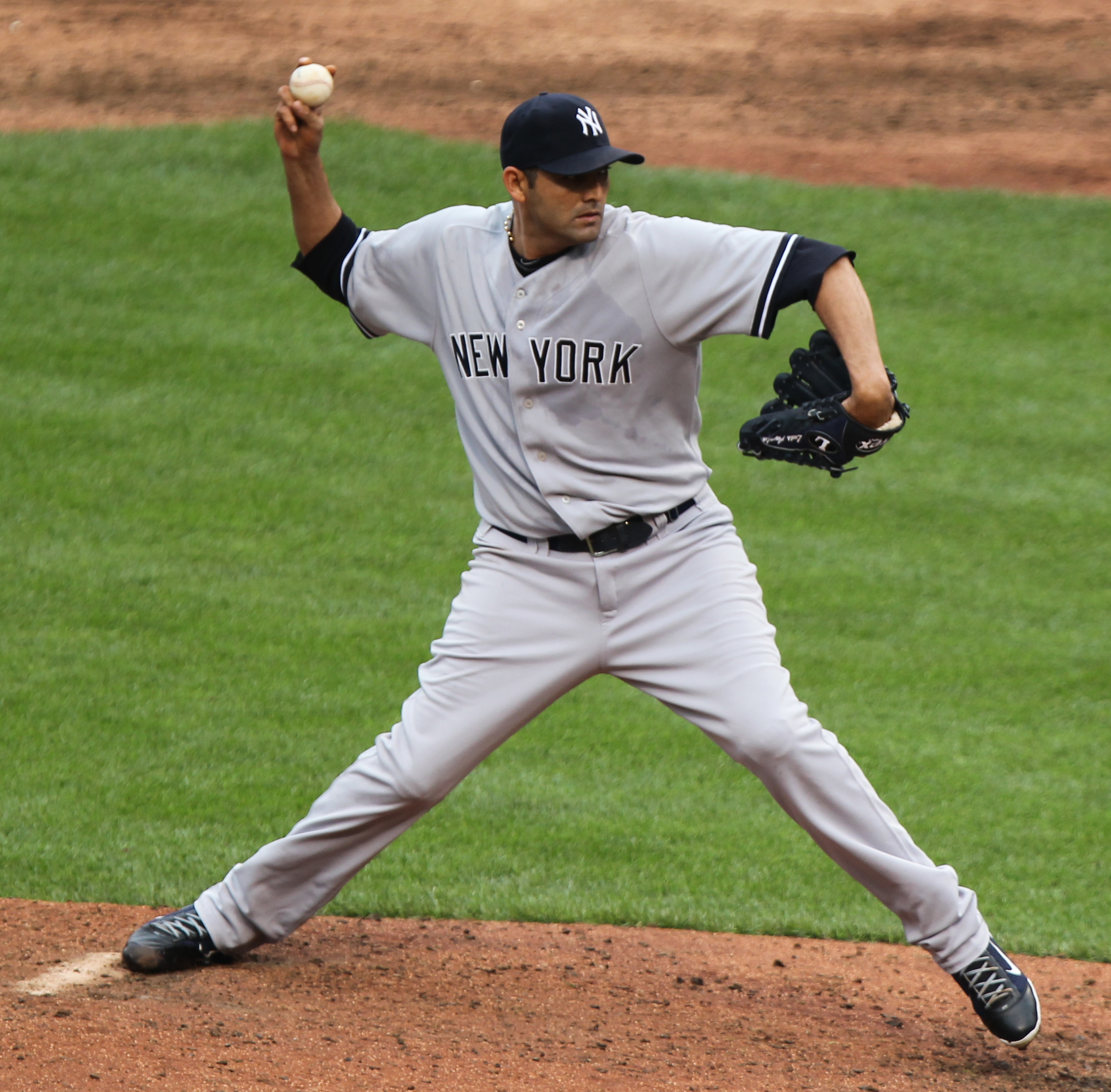 Luis Ayala